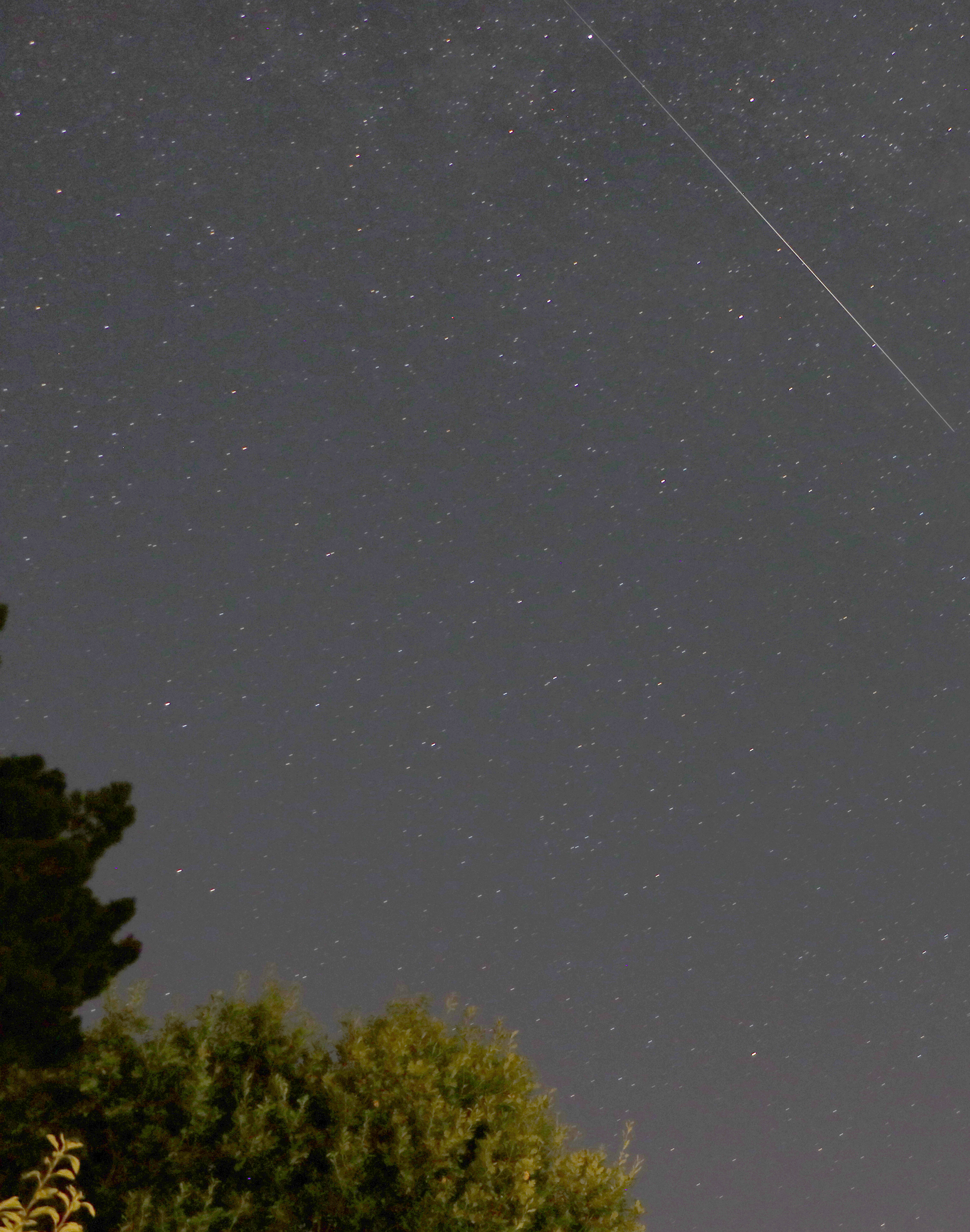 Sichtung einer Iridum-Flare über der bretonischen Halbinsel Crozon, August 2018